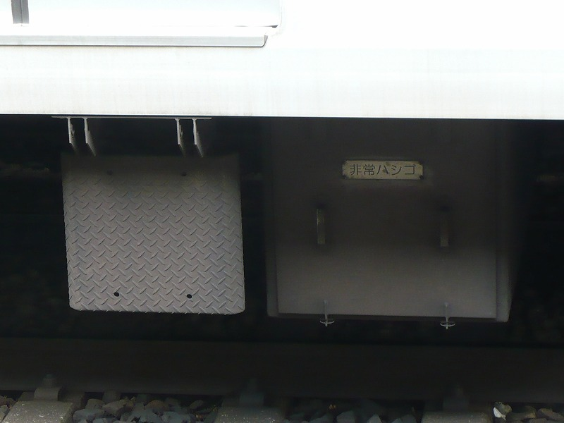 東武50050系の床下非常ハシゴ